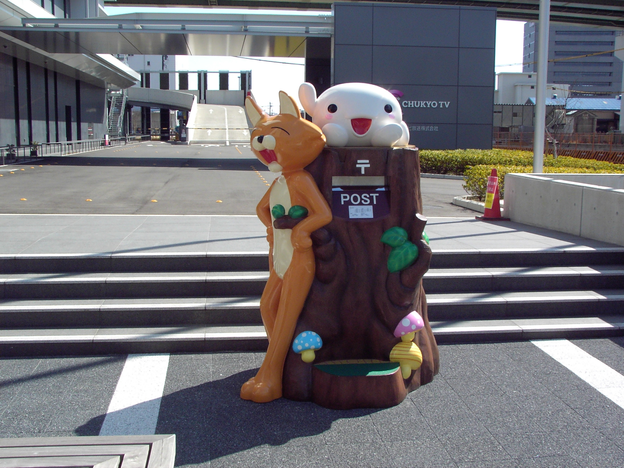 チュウキョ～くんポスト